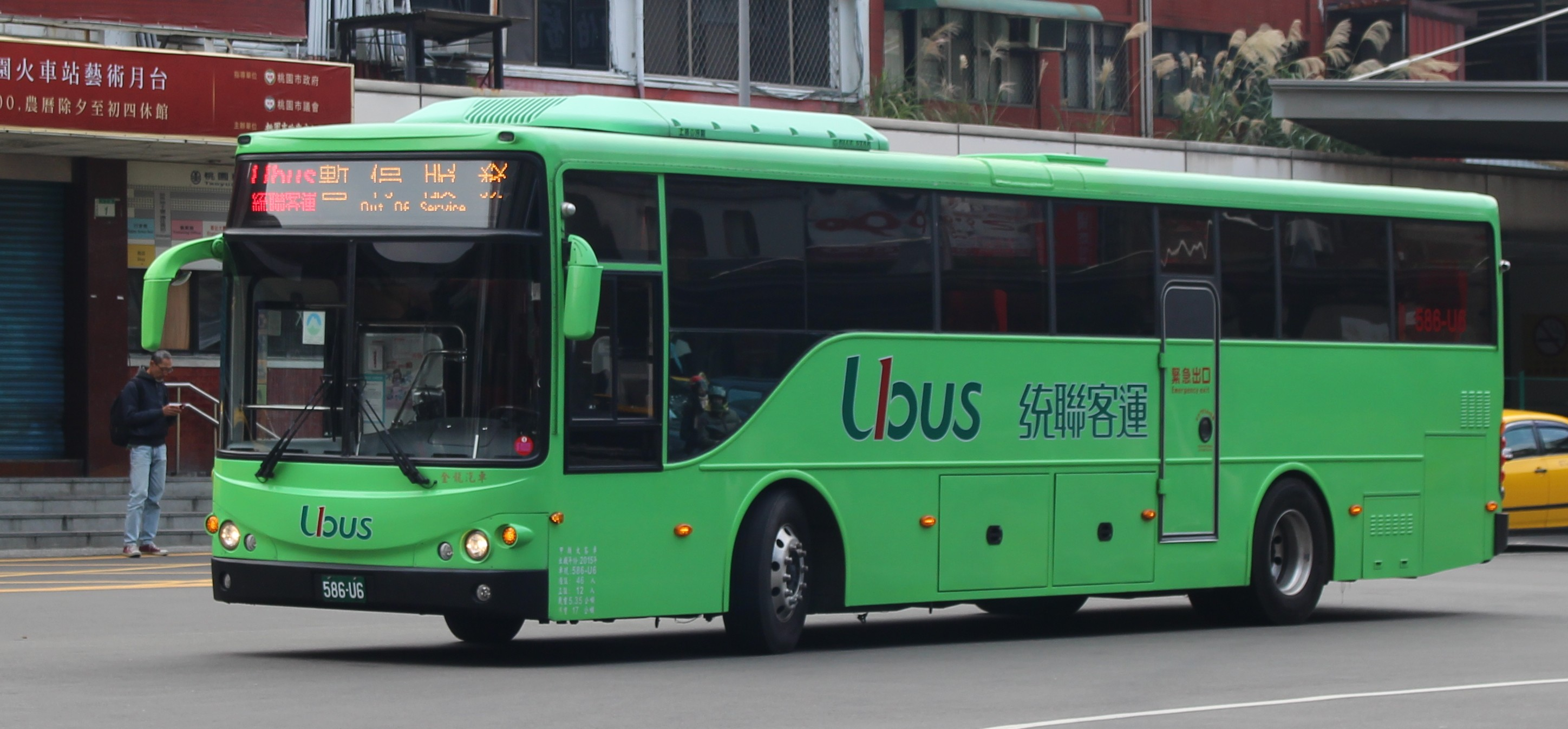 統聯客運大客車586-U6 暫停服務